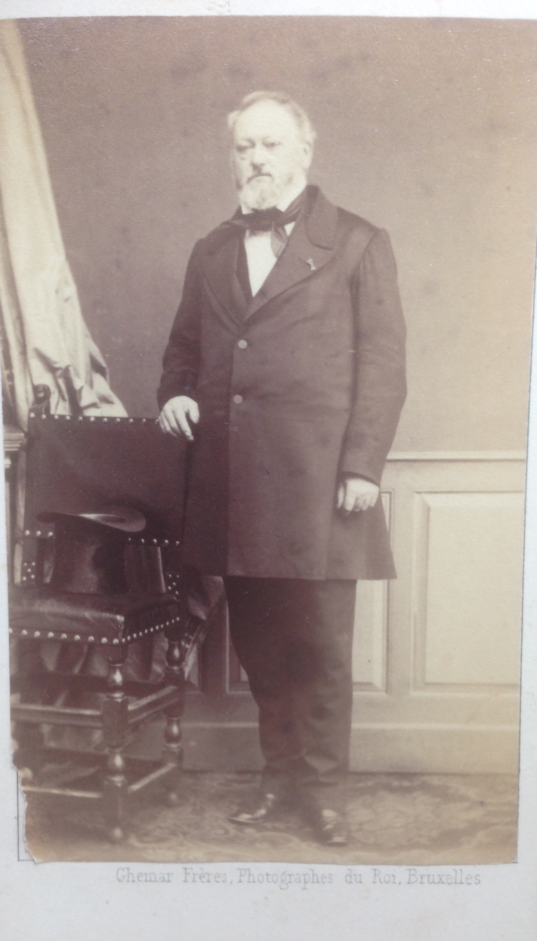 Joseph A. A. Dierckx